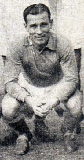 André Simonyi (février 1942).